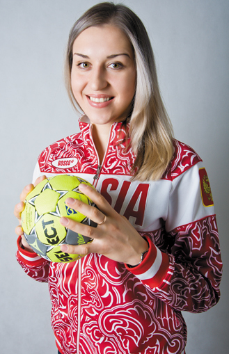 Ольга Акопян (Левина). Многократная чемпионка России по гандболу, двукратная чемпионка мира, двукратная победительница Кубка мира, серебряный и бронзовый призер чемпионатов Европы, заслуженный мастер спорта. Фотография из серии «Лица эстафеты».